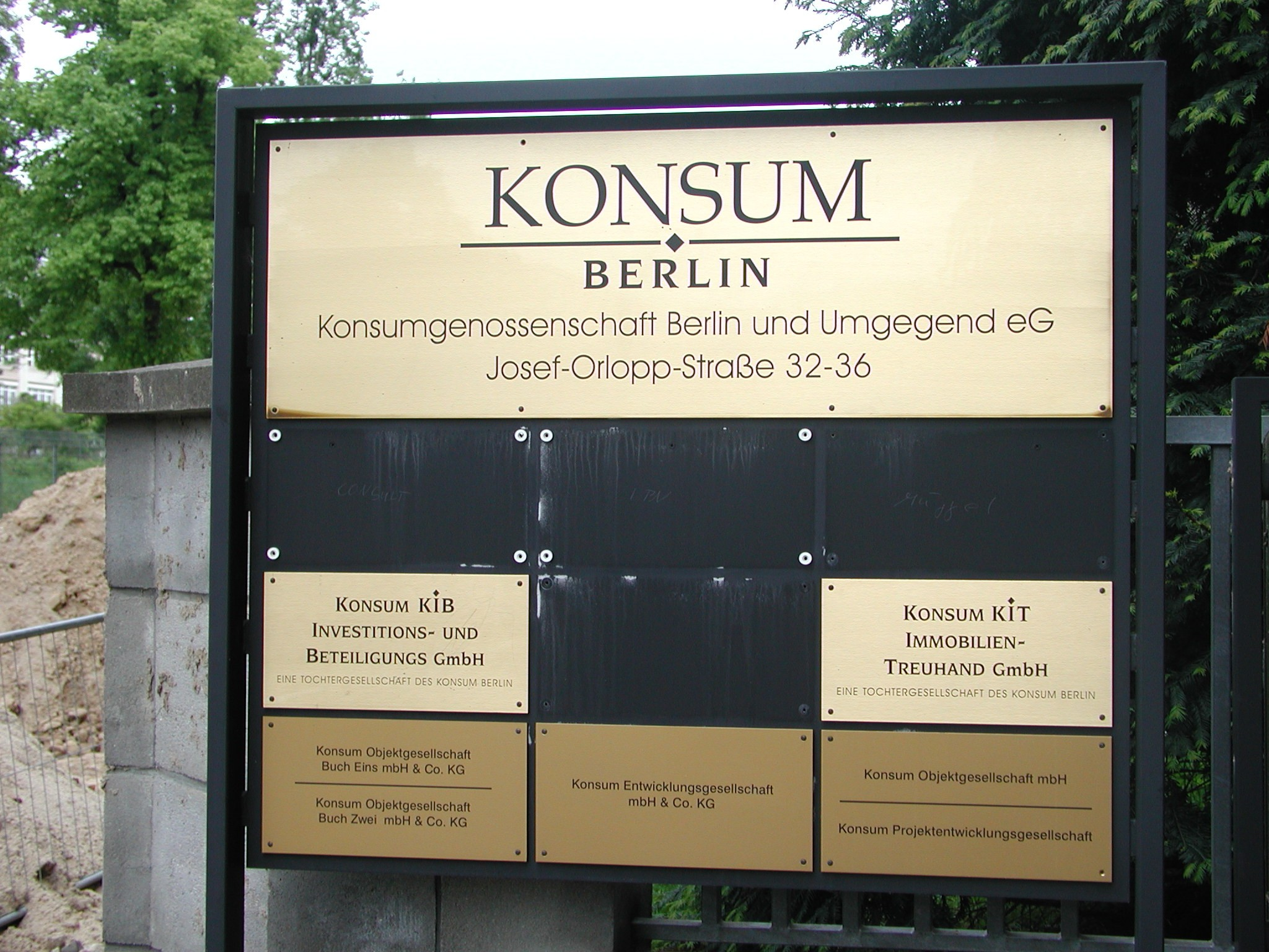 Berliner Konsumgenossenschaft und 5 "Töchter", 2006